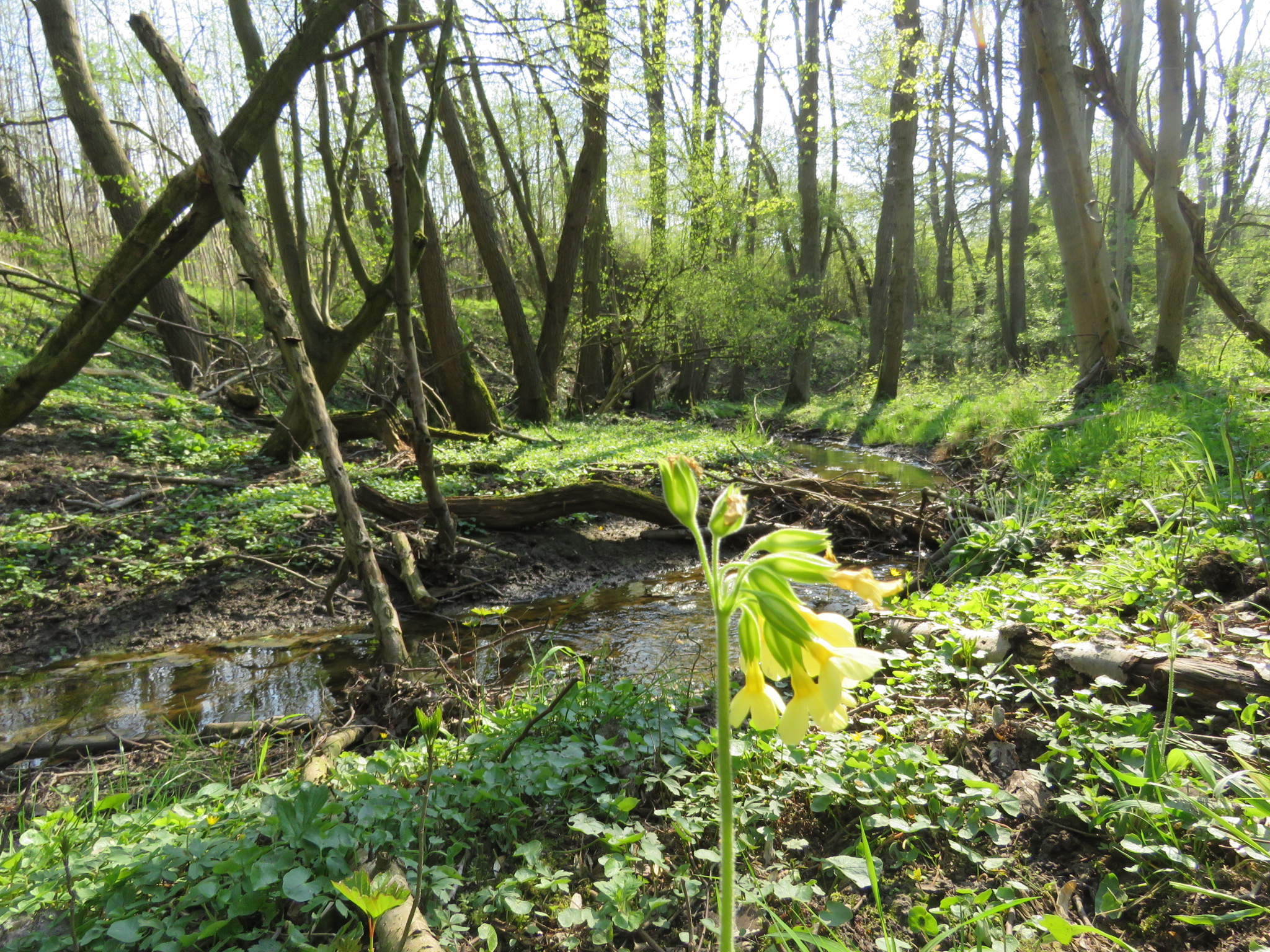 Biosphärenreservat Schaalsee an der Steinernen Rinne bei Campow